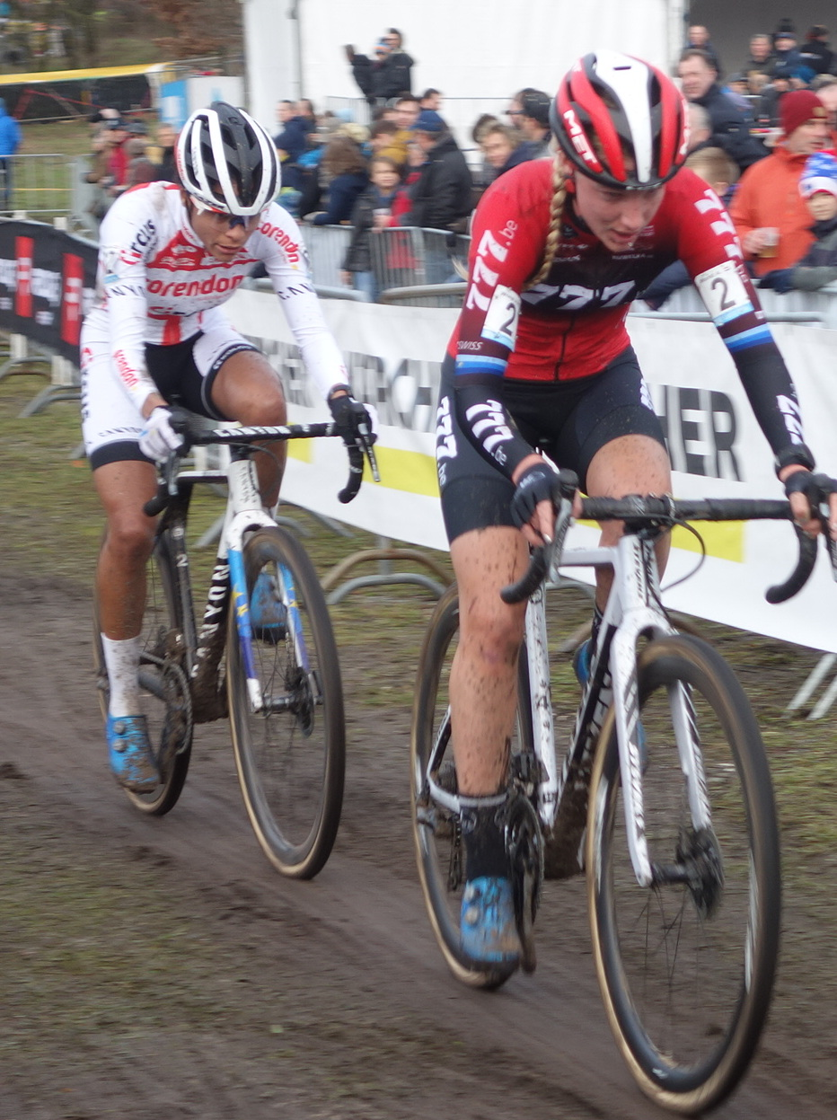 Superprestige veldrijden in de kuil van Zonhoven op zondag 8 december 2019